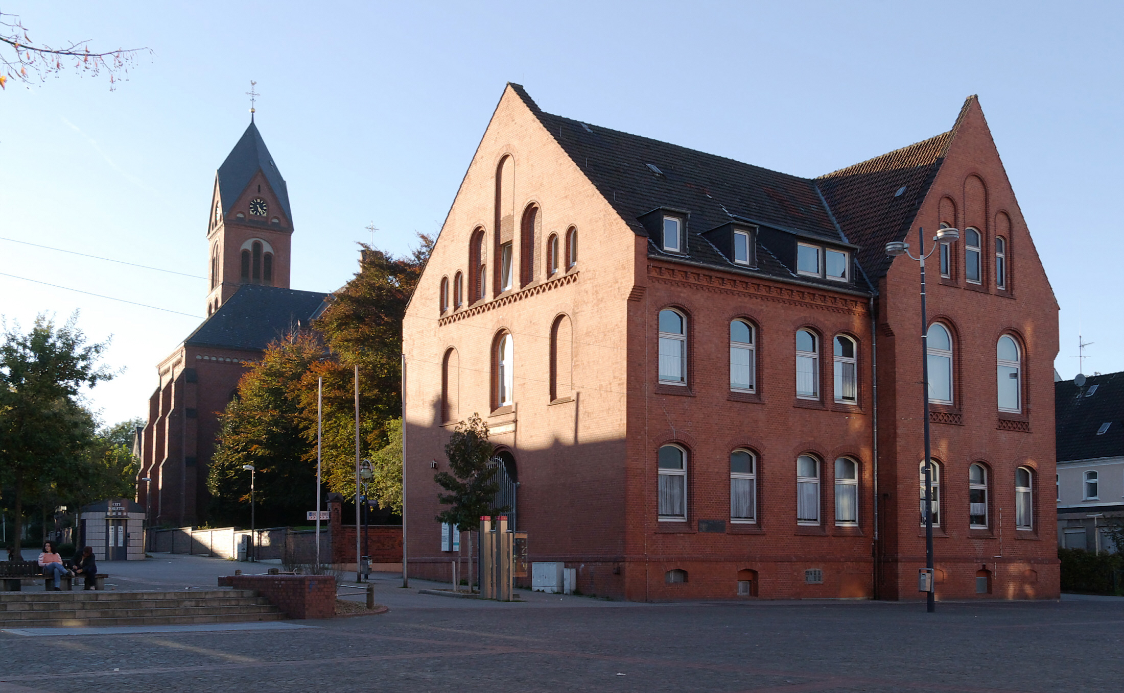 Amtshaus am Markt in Lütgendortmund, Dortmund, Germany. Im Hintergrund die Kirche St. Magdalena